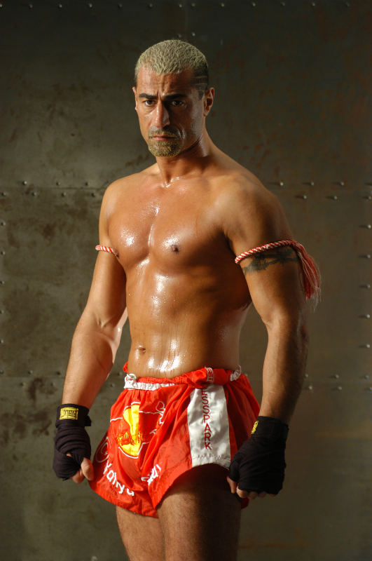 Foto von Yahya Gülay